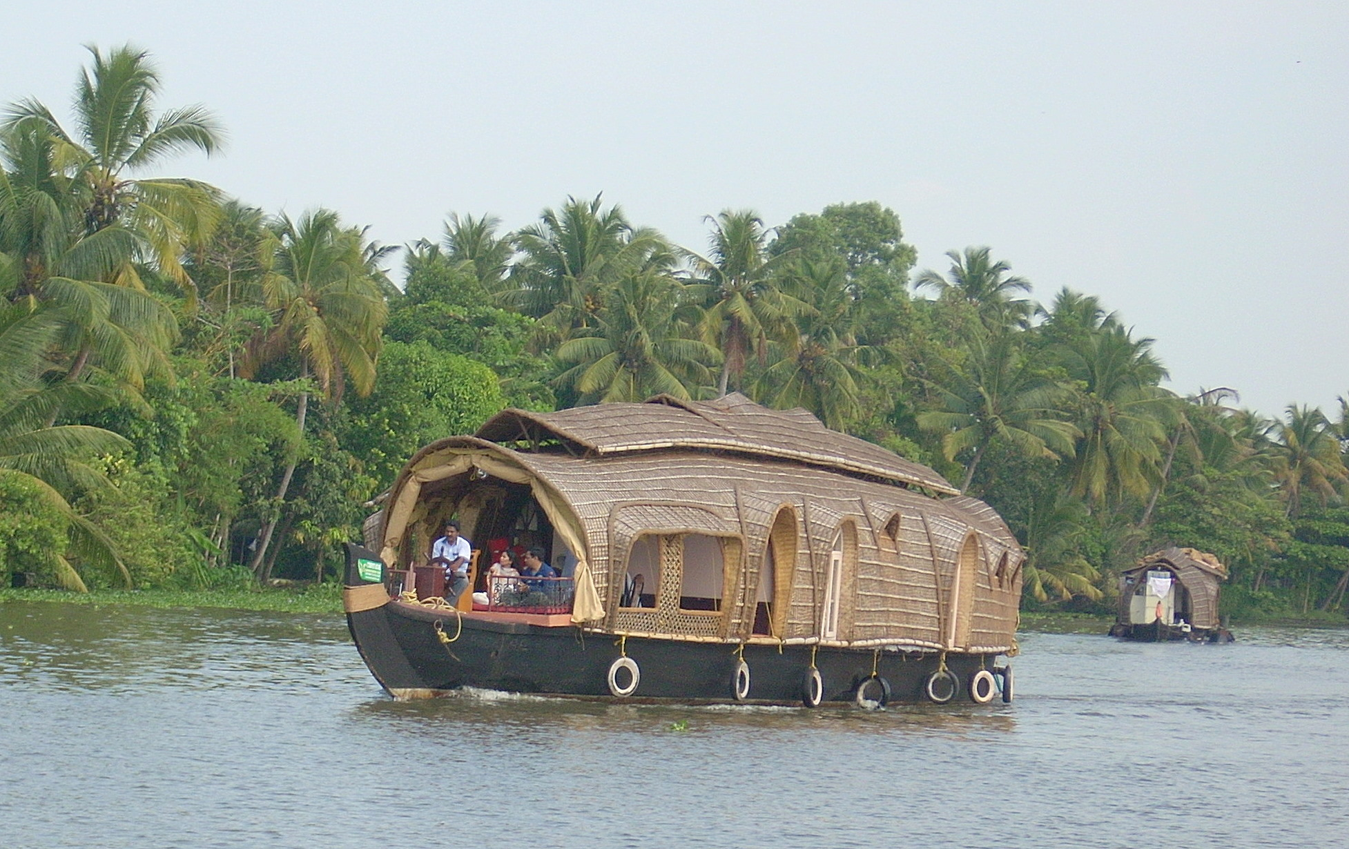 Kerala houseboat